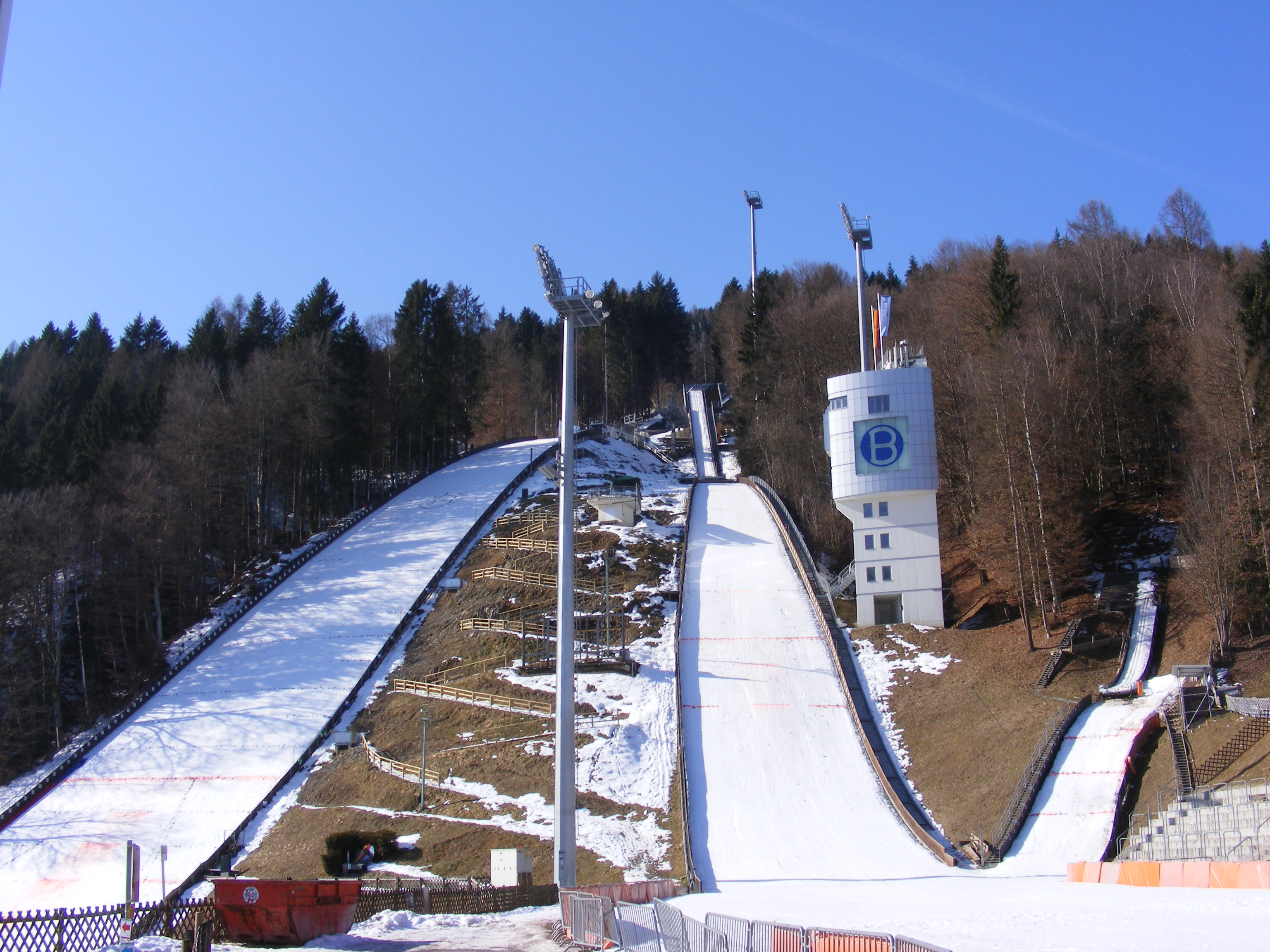 Skisprunganlage Sepp Bradl in Bischofshofen; links: Paul-Außerleitner-Schanze, Mitte: Laidereggschanze